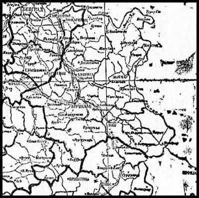 Мапа Моравске бановине